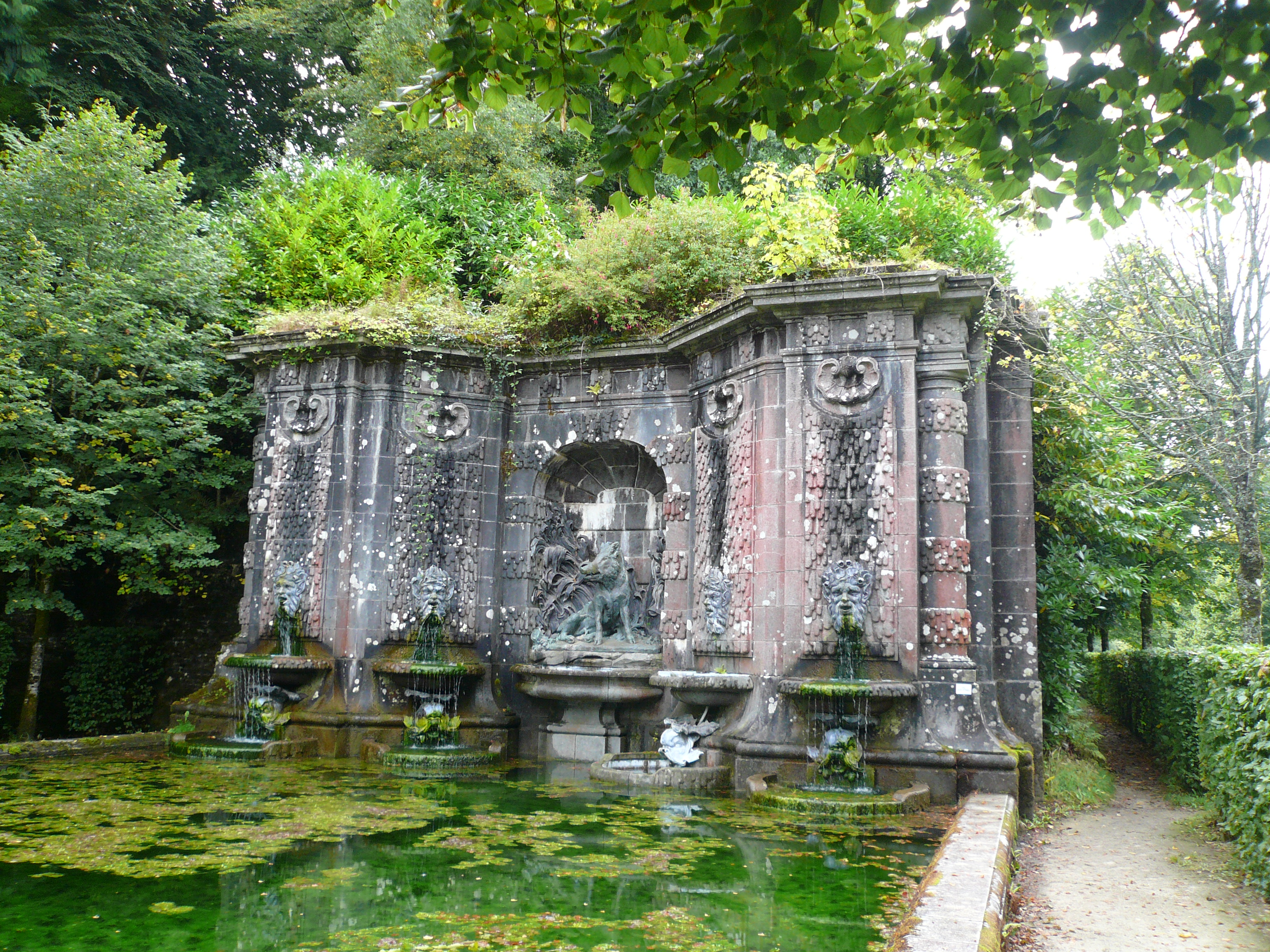 Vue d'ensemble du buffet d'eau du bassin de la Chasse, dans le parc du château de Trévarez, Saint-Goazec, Finistère, Bretagne, France. Œuvre de Florian Kulikowski et Jules Visseaux, 1903. .